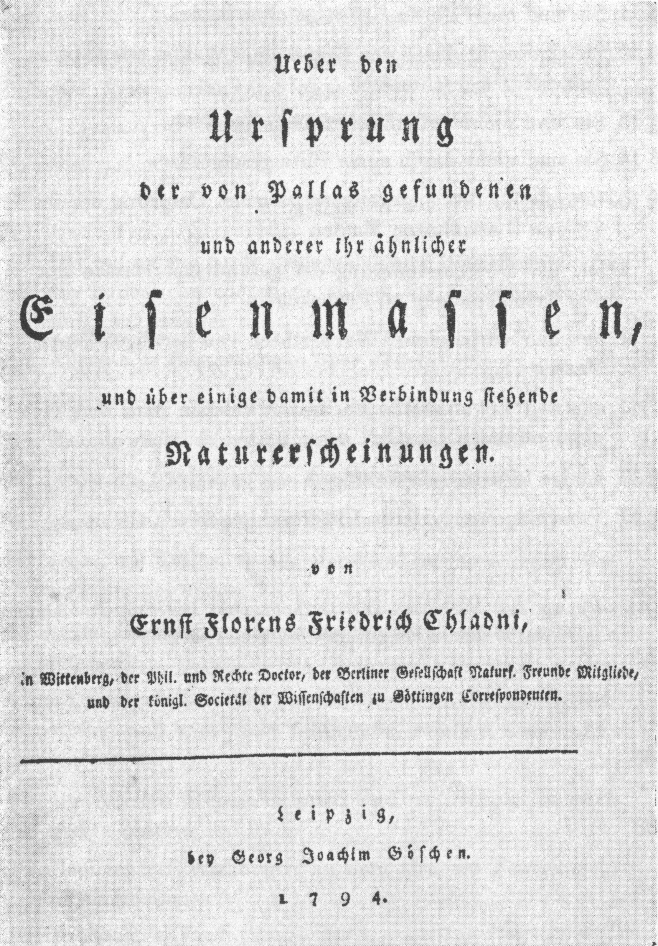 Titelblatt von Ernst Florens Friedrich Chladnis Werk Ueber den Ursprung der von Pallas gefundenen und anderer ihr ähnlicher Eisenmassen.